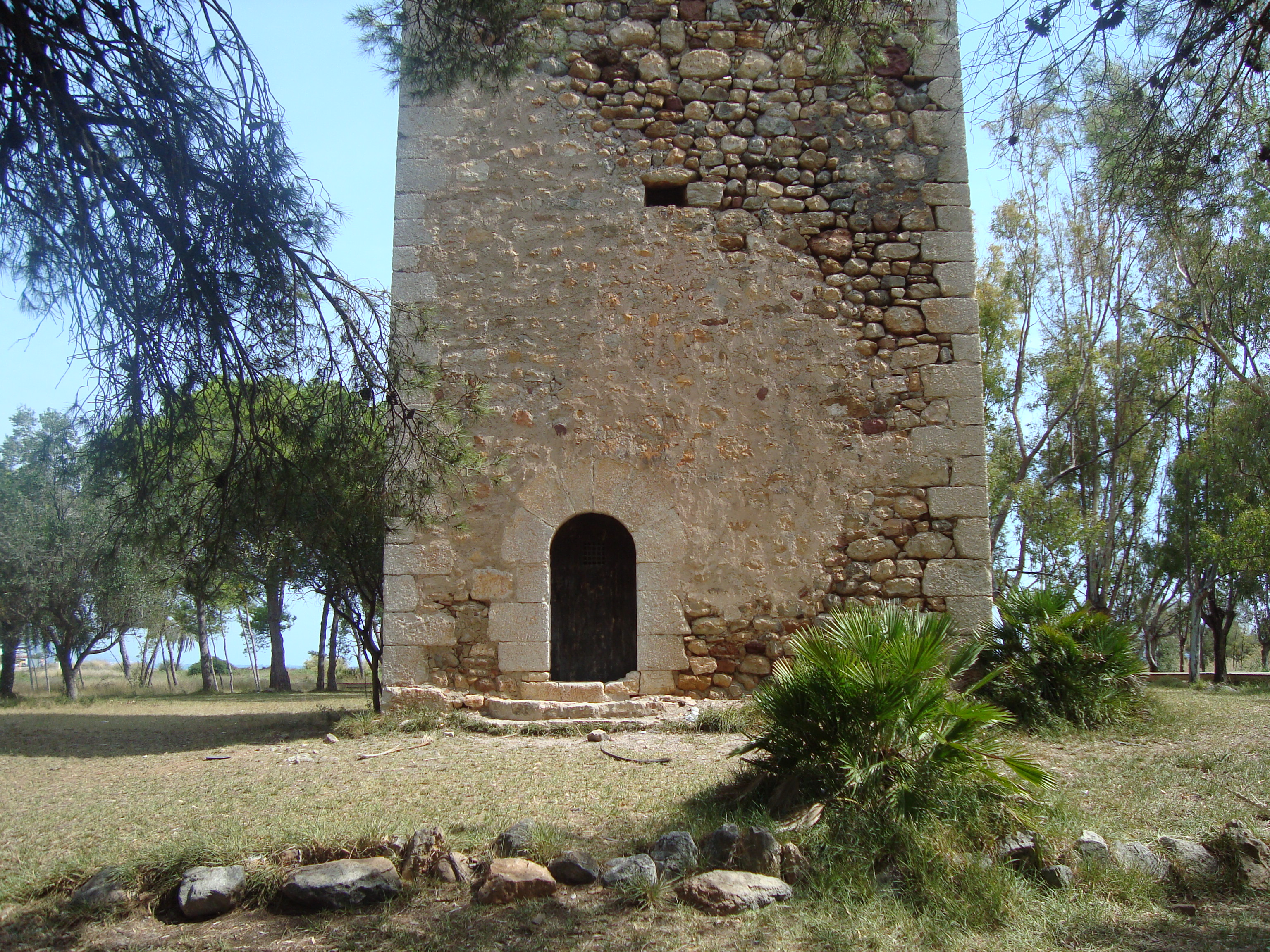 Torre de Torrelasal, antigua torre vigia de la costa litoral del Reino de Valencia.